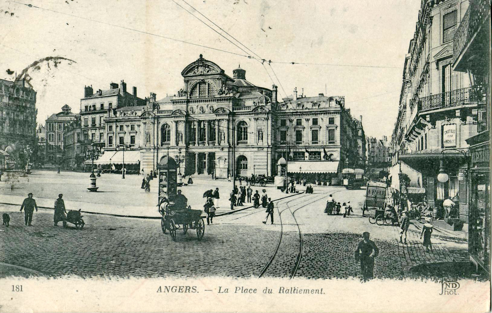 Carte postale ancienne éditée par ND, n°181 : ANGERS - La Place du Ralliement